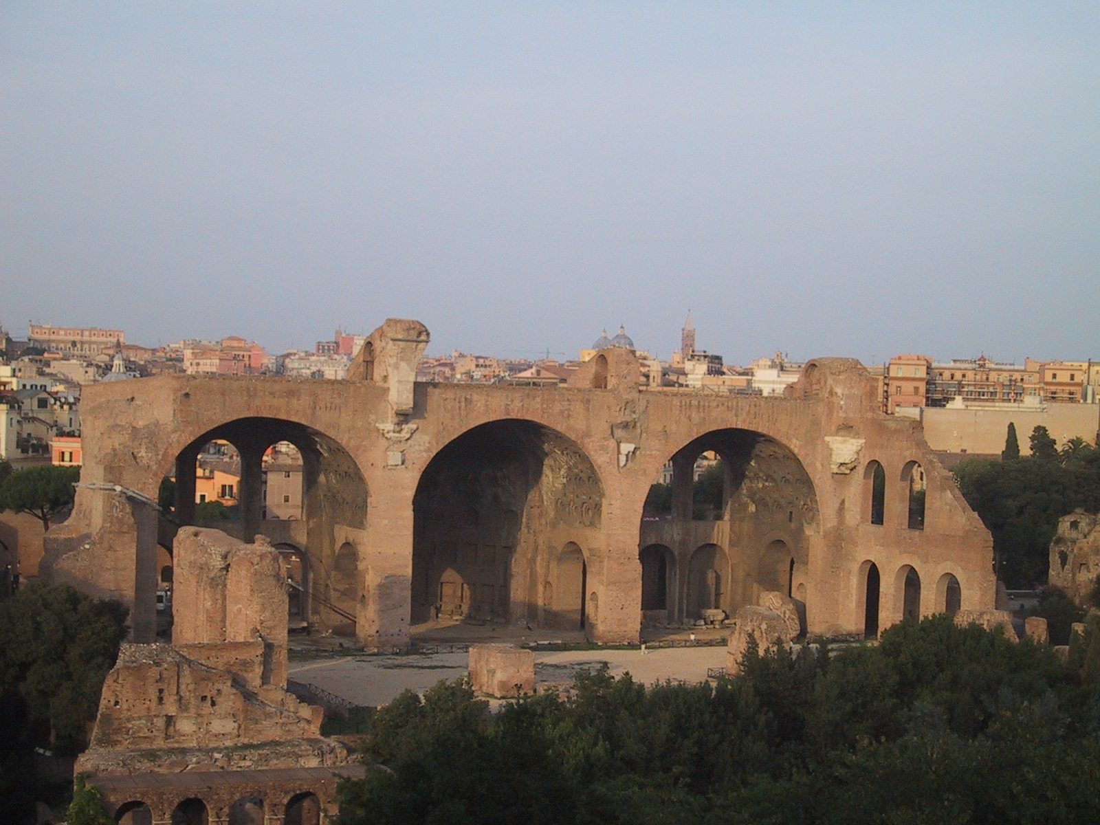 View of Maxentius Basilica, from archeological area. Personnal picture Basilique de Maxence, arcades de la nef nord. Photo personnelle.